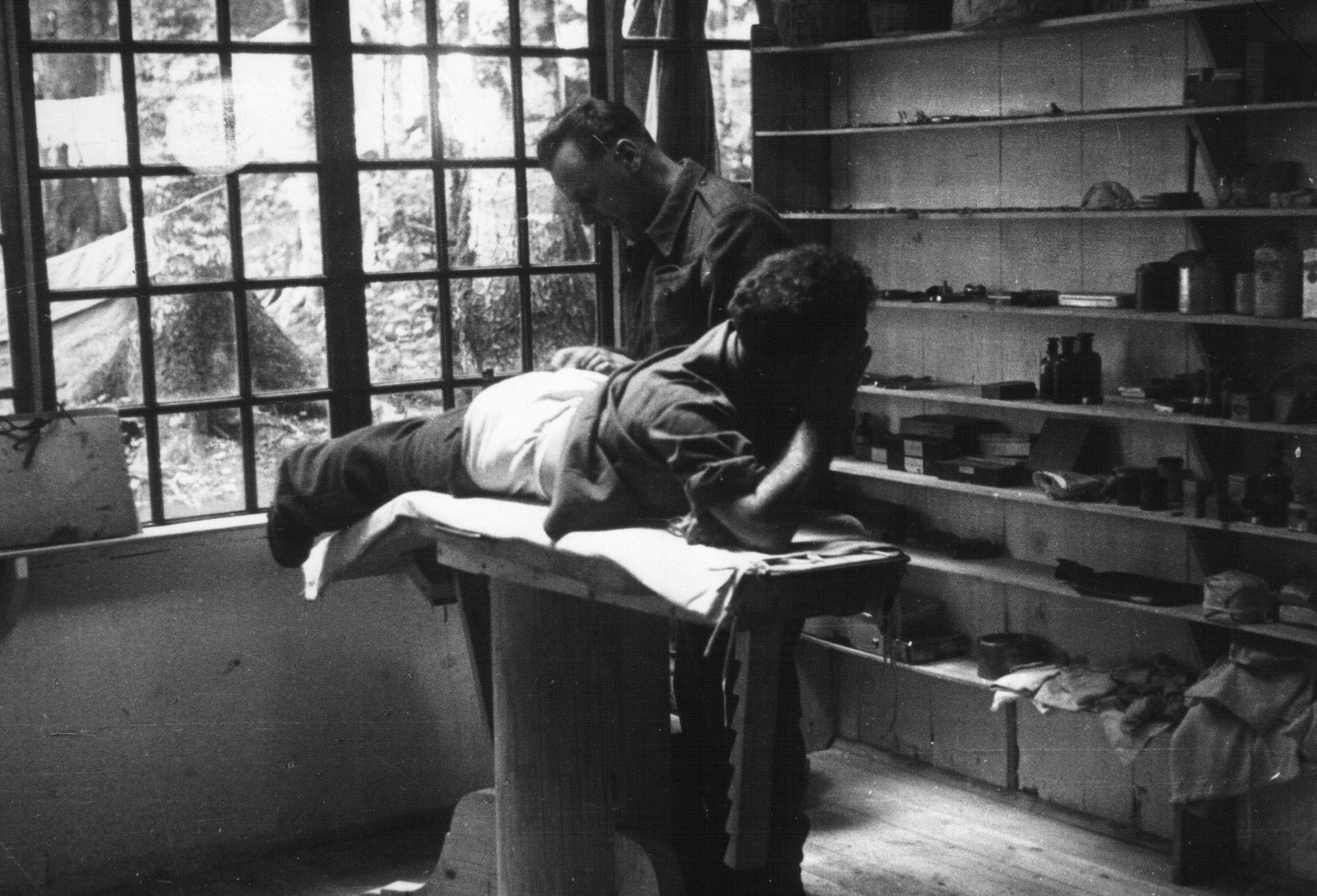 Kirurški poseg v v partizanski bolnišnici Lesen Kamen